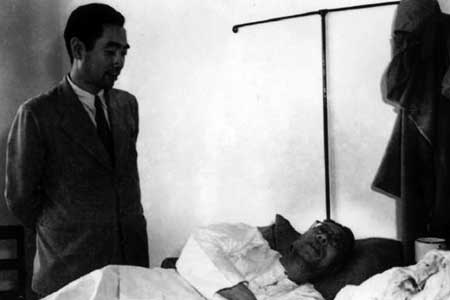 1946年6月24日，周恩来（后立）闻讯赶到医院看望马叙伦，马叙伦激动的说：“现在只有靠你们了！”